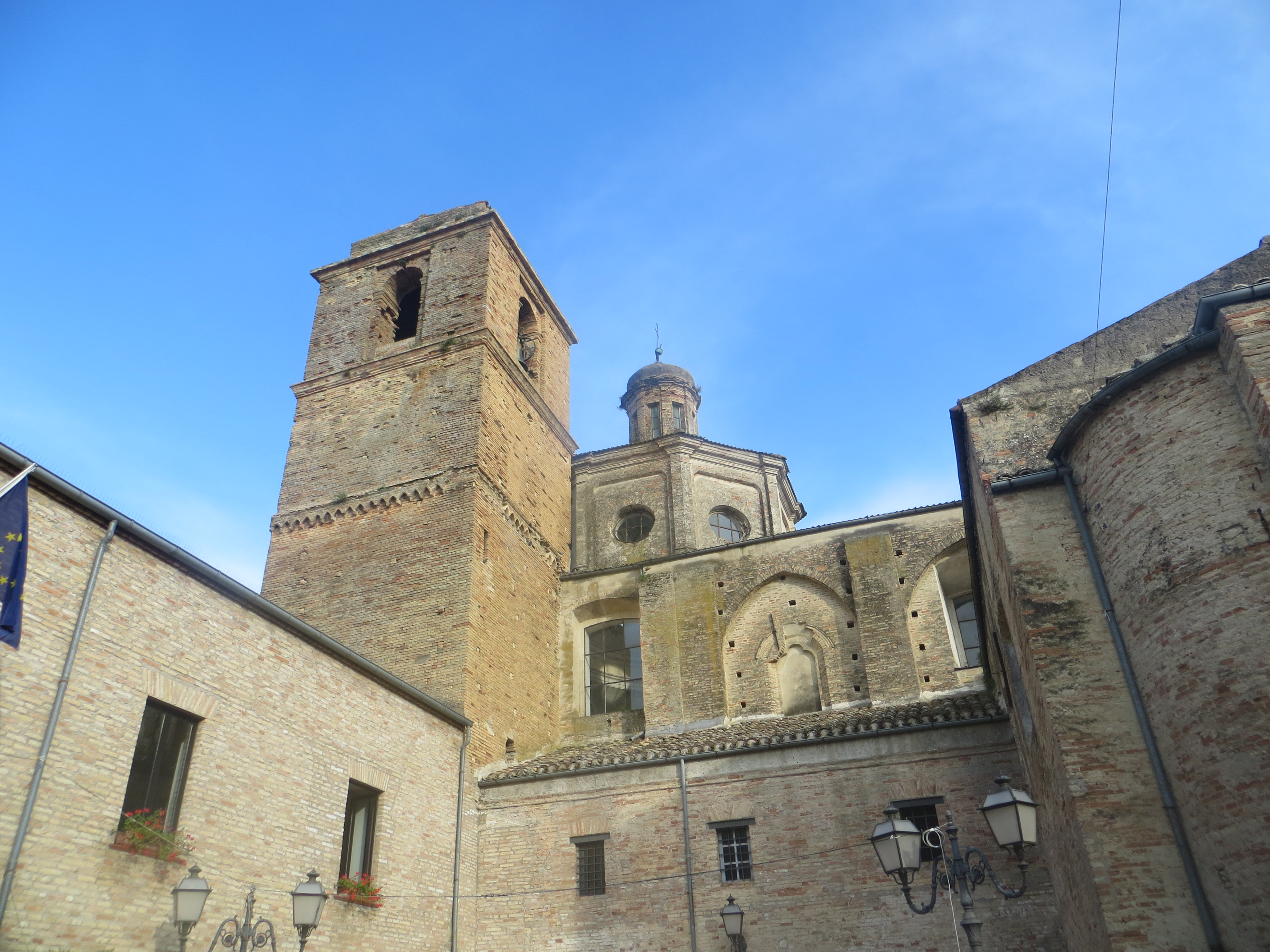 Chiesa di San Francesco a Città Sant'Angelo